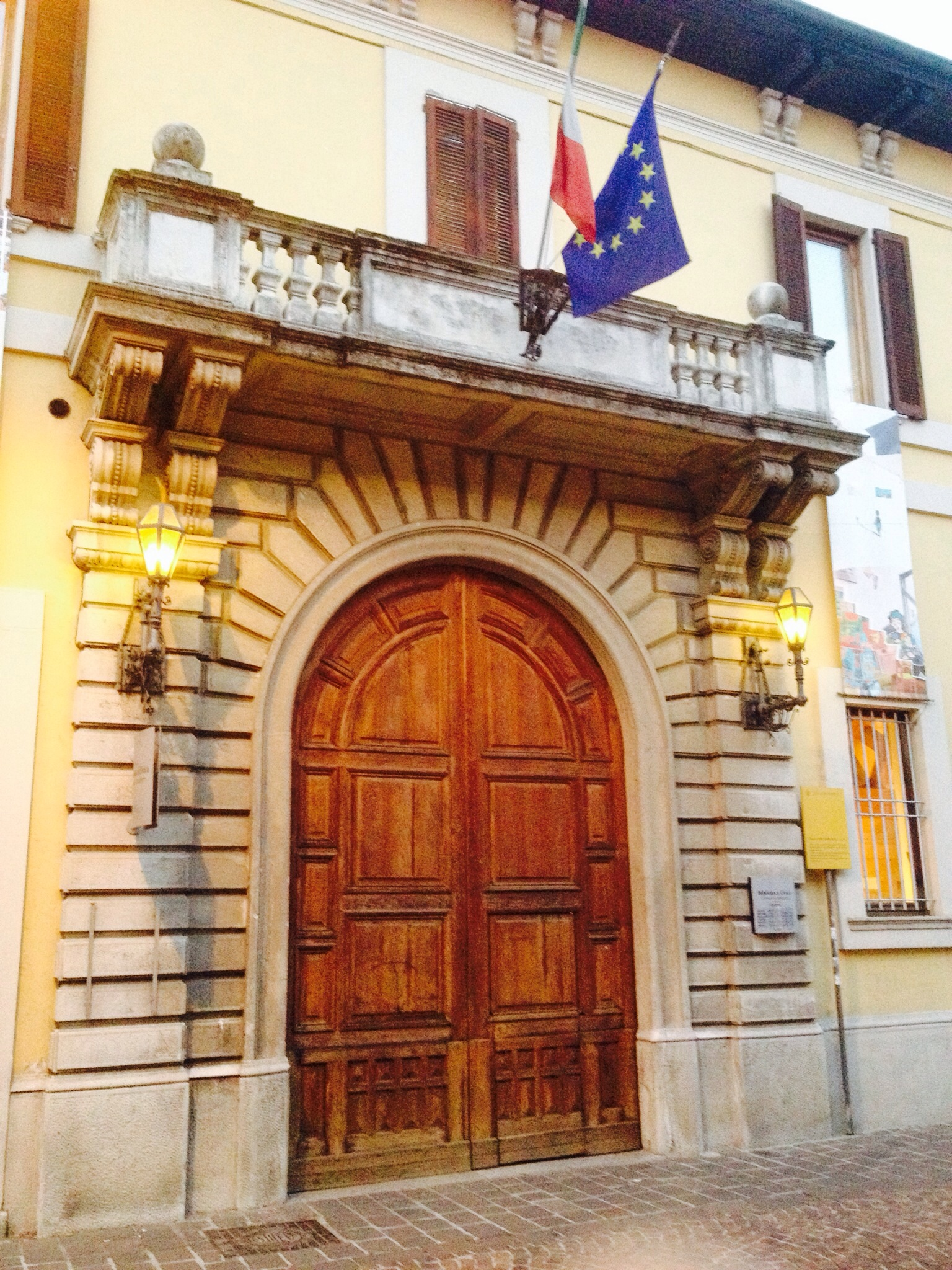 Palazzo Ghirlanda Silva (sede biblioteca comunale) This is a photo of a monument which is part of cultural heritage of Italy.